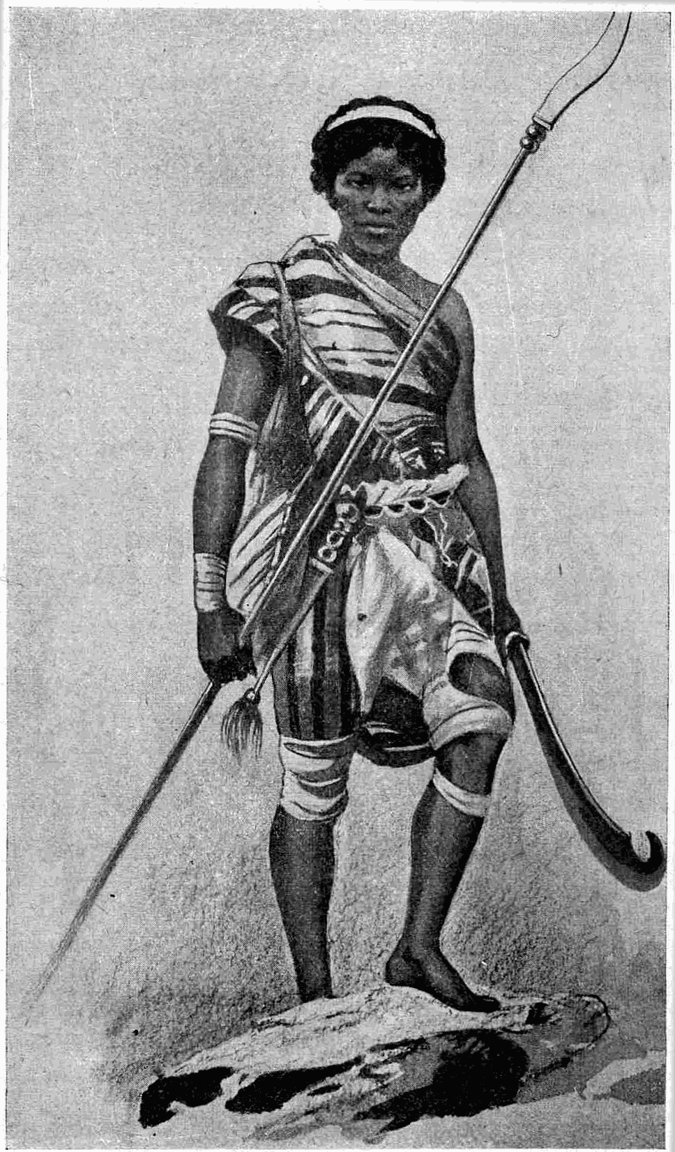 amazone dahoméenne